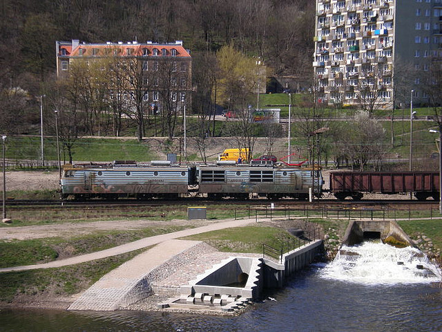 Zaroślak i Opływ Motławy w Gdańsku, 044 ET42-029 pulling empty coal cars. Camera: Olympus FE190/X750 License on Flickr (2011-02-13): CC-BY-SA-2.0 Flickr tags: 2007.04.14, gdańsk, et42, pkp, dolne miasto, danzig, trainspotting, devastation